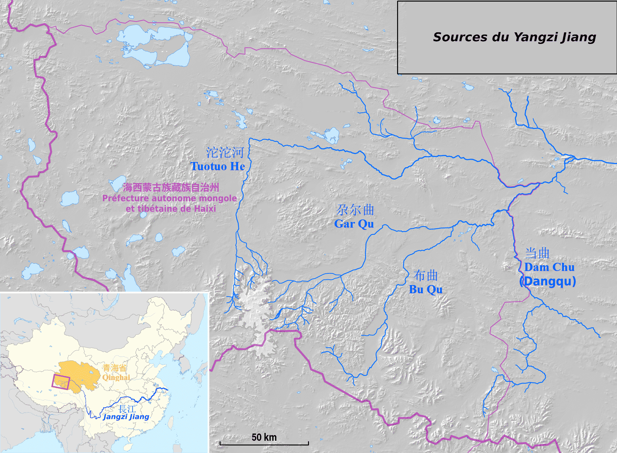 Sources du fleuve Jangzi Jiang sur le plateau tibétain (province du Qinghai) version francisée